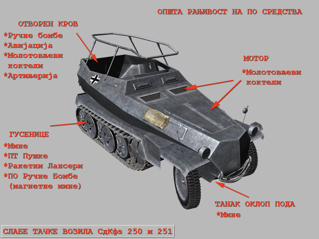 Аутор сам ја, модел је мој као и текстуре, скица је моја. Служи да се покажу слабе тачке возила